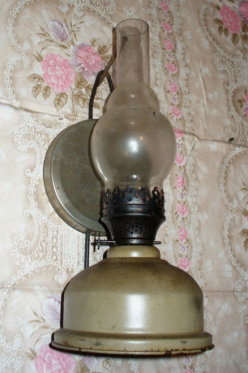 Керосиновая лампа на стене.